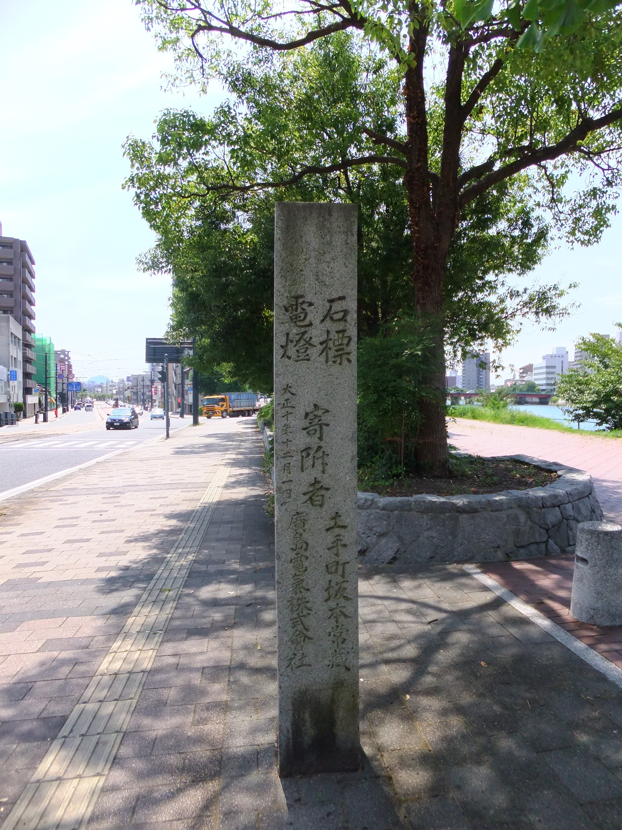 比治山橋 横の石碑